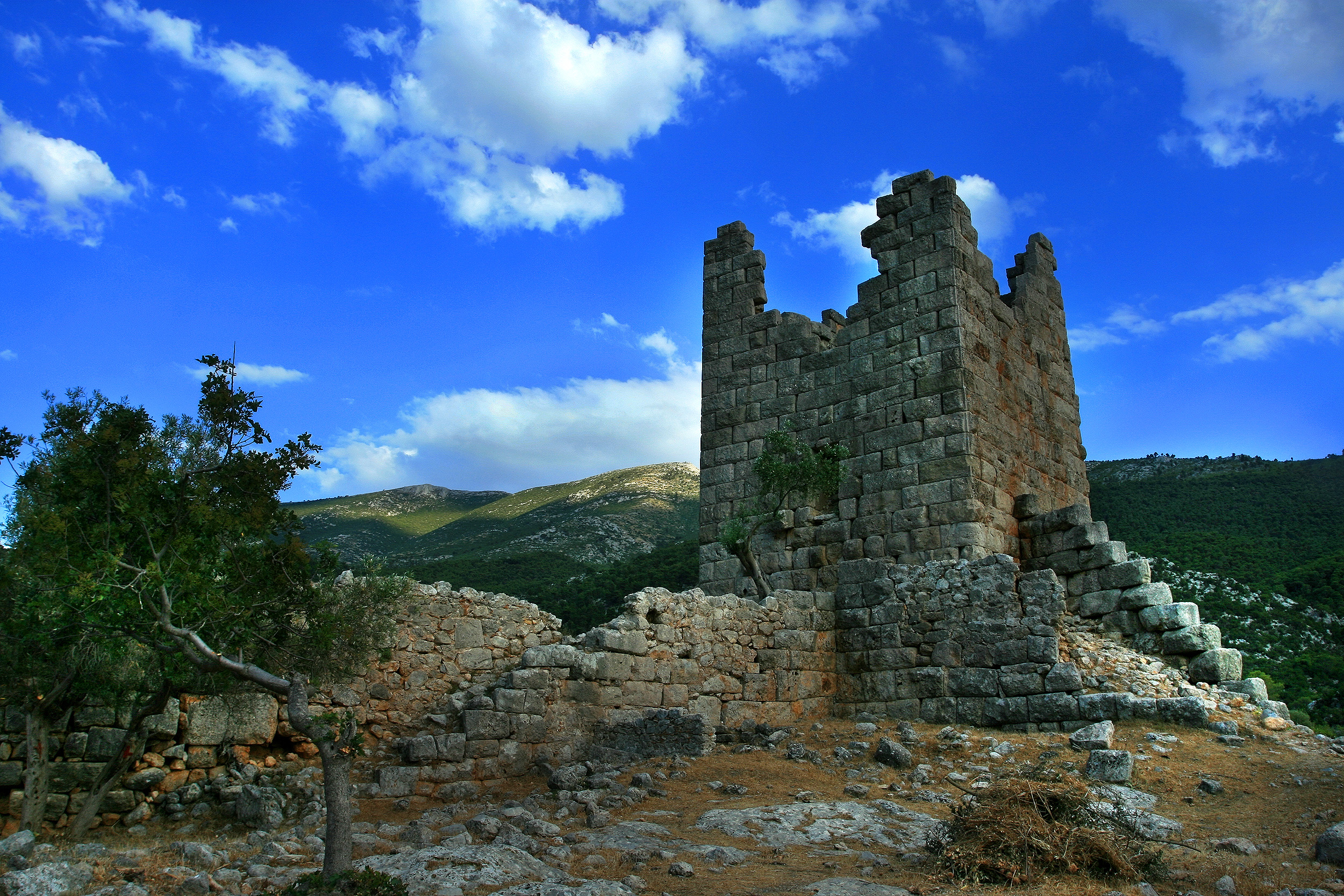 Αρχαίο Φρούριο Αιγοσθένων«Αιγόσθενα»